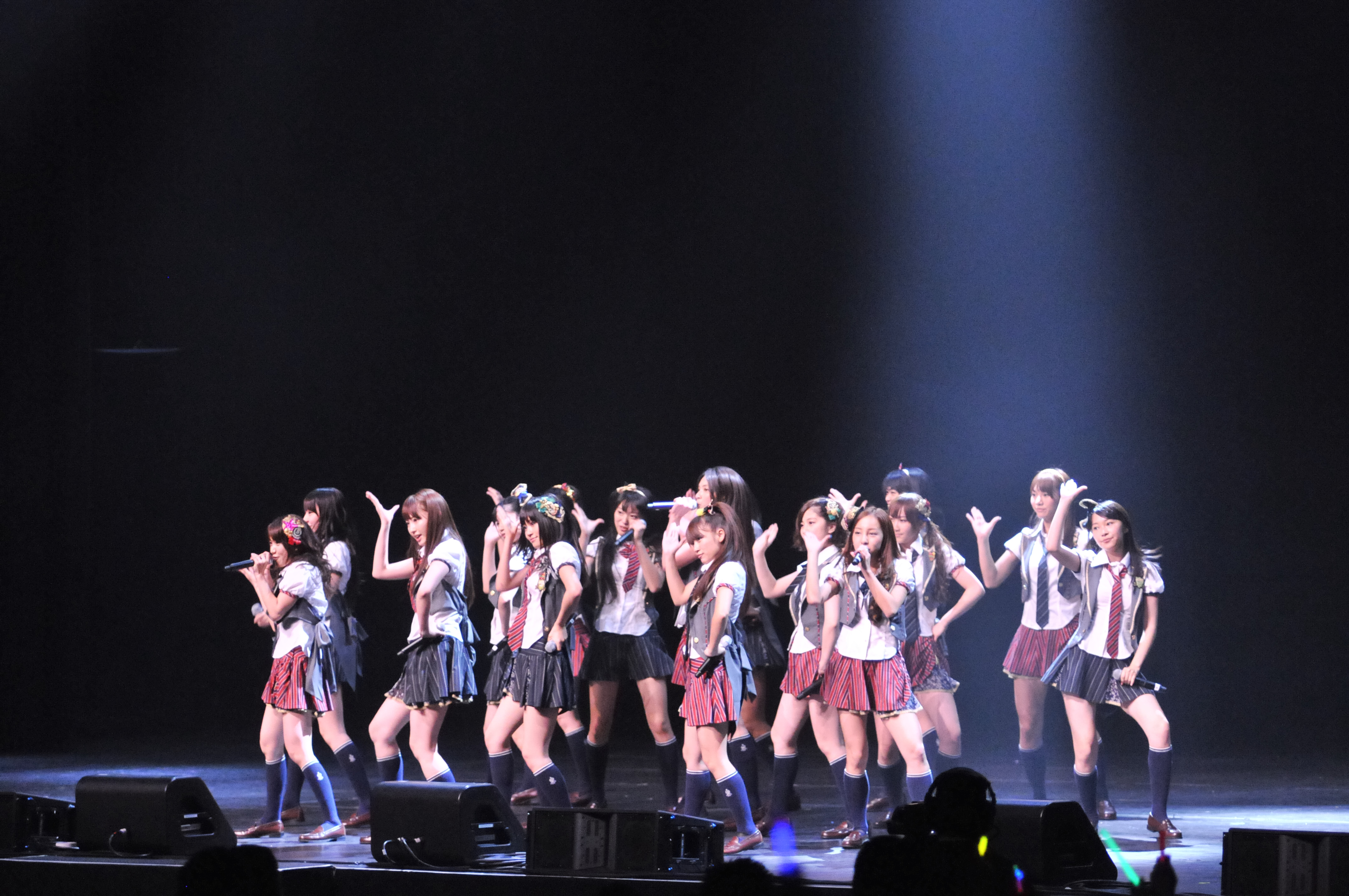 ax10akb17